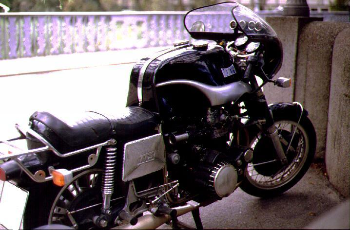 Münch 1000, deutsches Motorrad-Modell selbst fotografiert Anfang der 1990er Jahre am Deutschen Museum, München Kassander der Minoer 21:24, 5. Dez 2005 (CET)